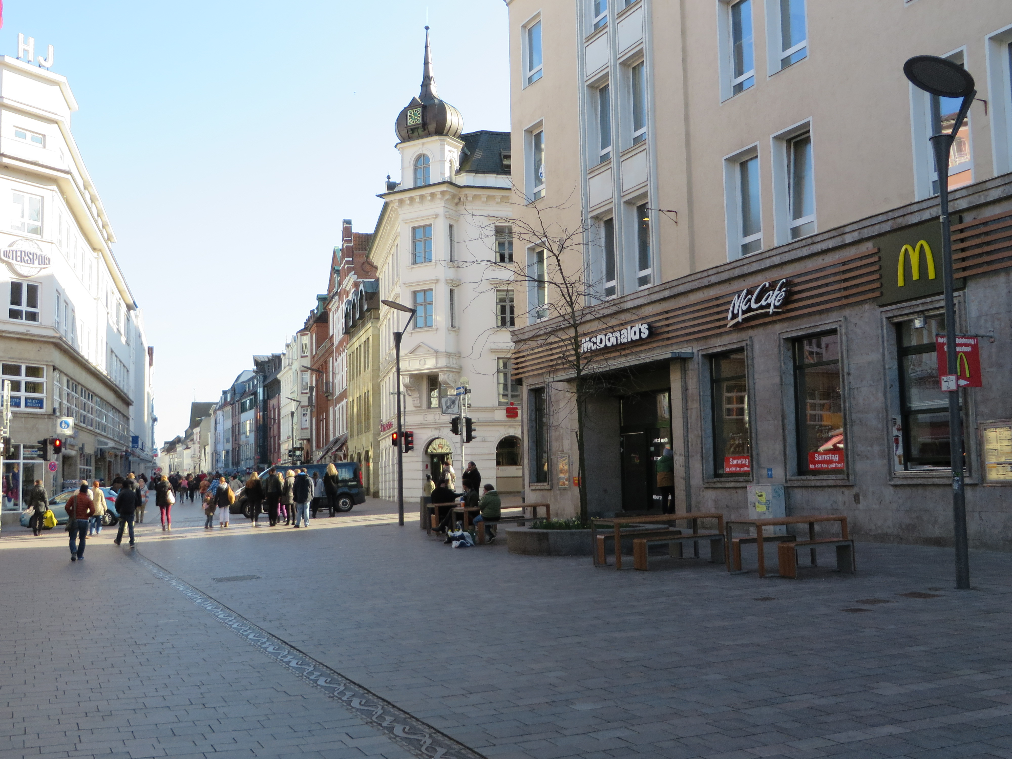 Beim Thingplatz (Flensburg), Bild 02